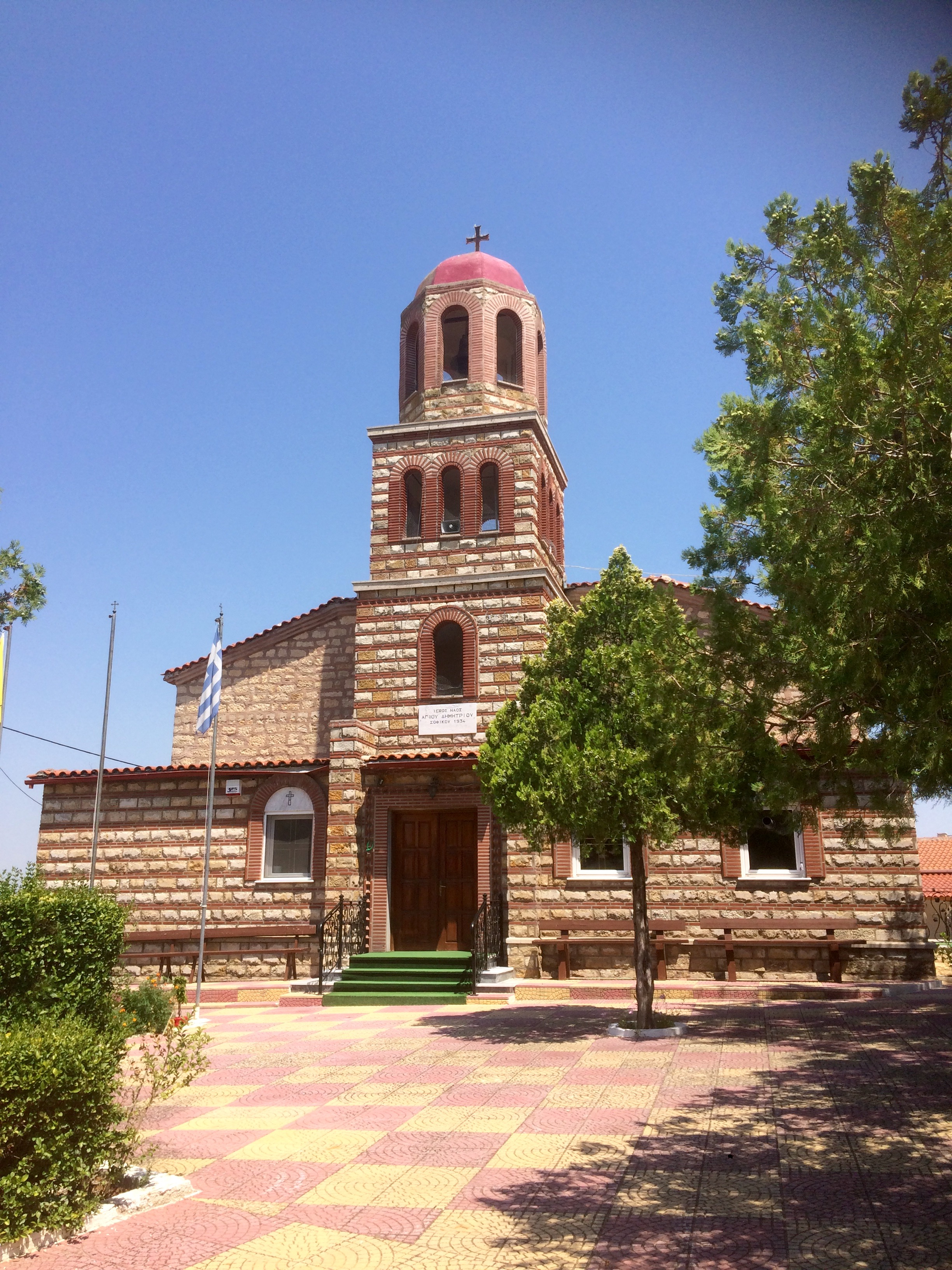 Die im Stil der Spätbyzantinschen Architekturart erbaute Kirche des Heiligen Dimitrios in Sofiko